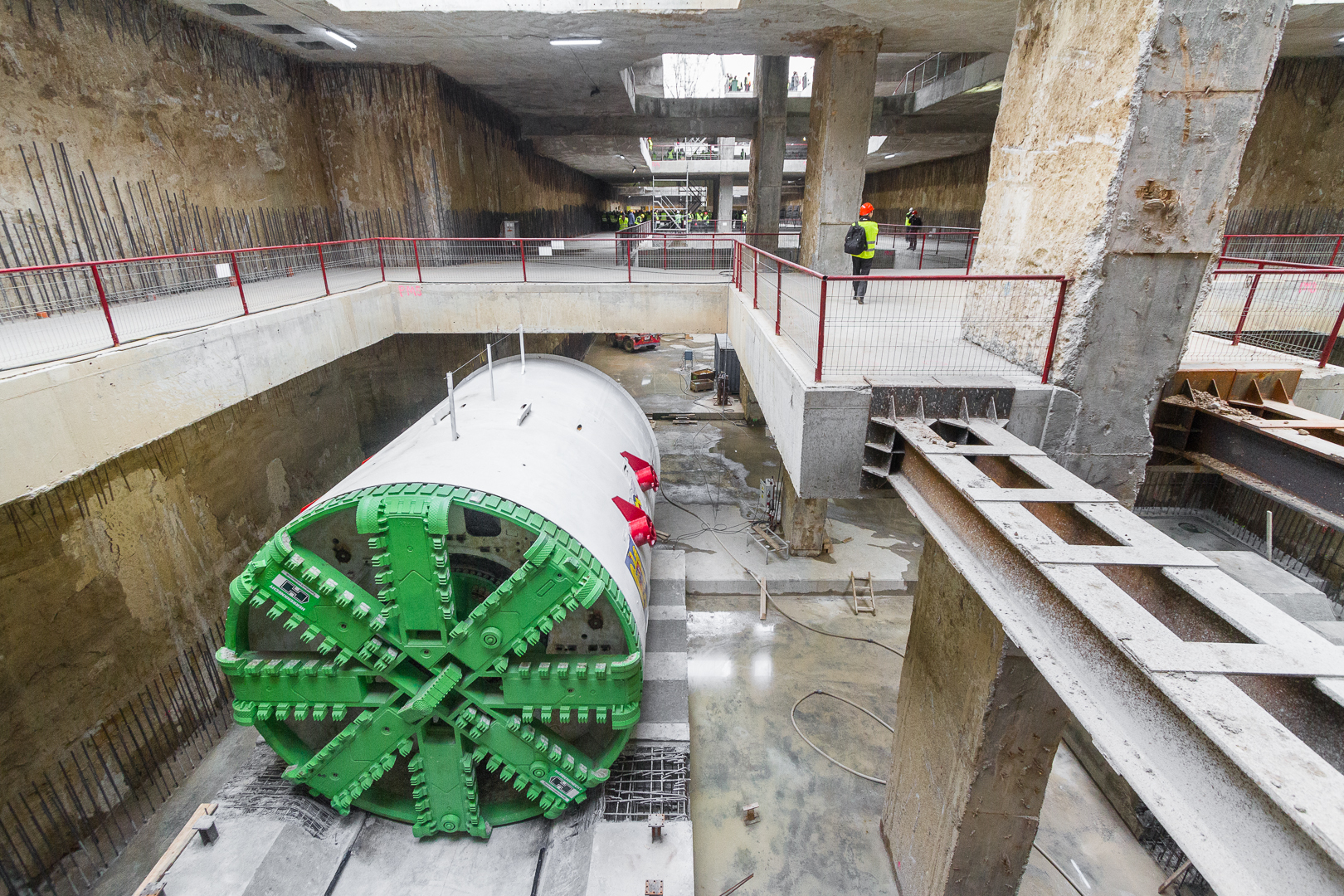 Santier Metrou - Academia Militara, Bucuresti